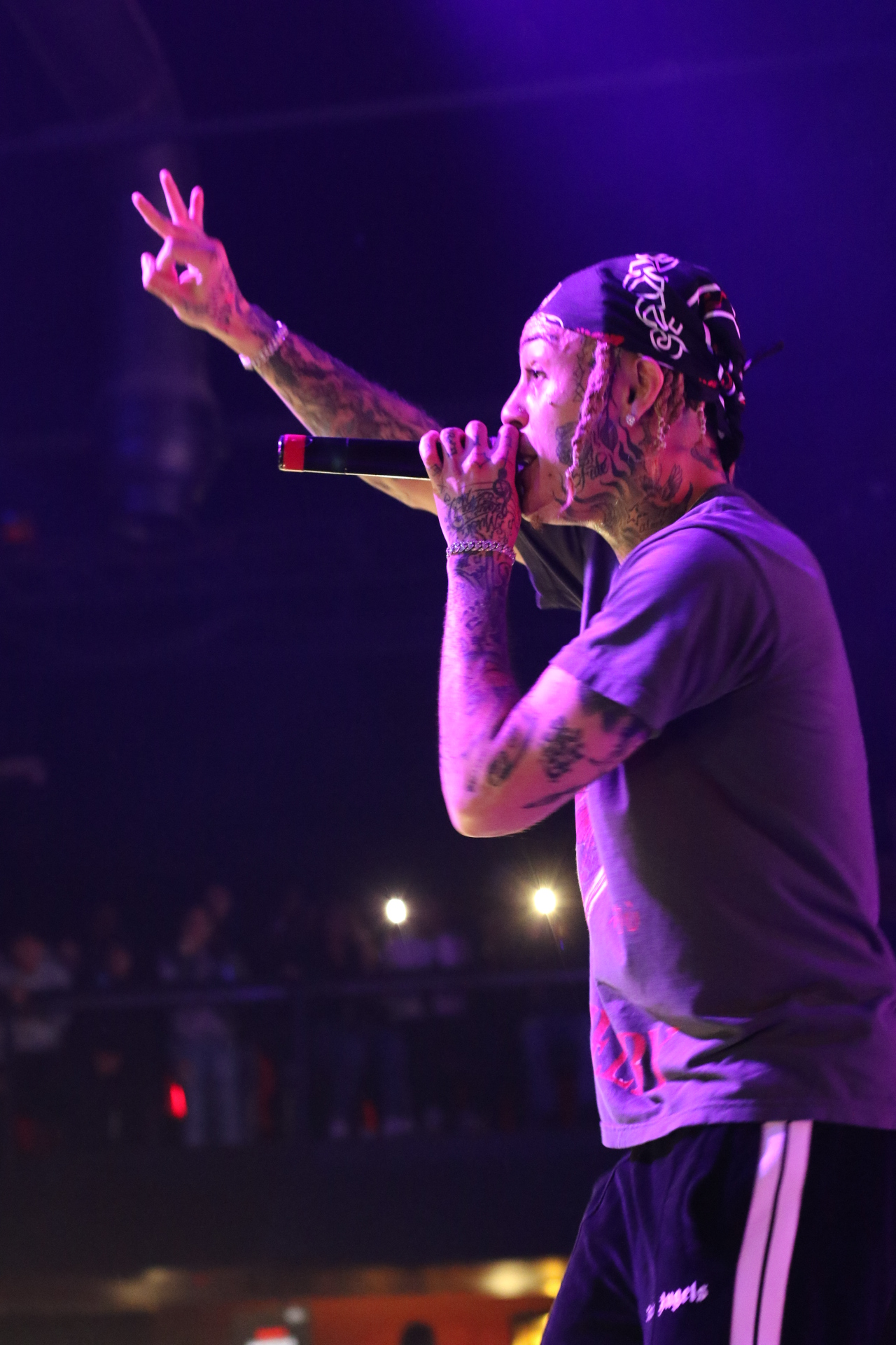 Lil Skies ::: Fillmore Auditorium ::: 05.01.19